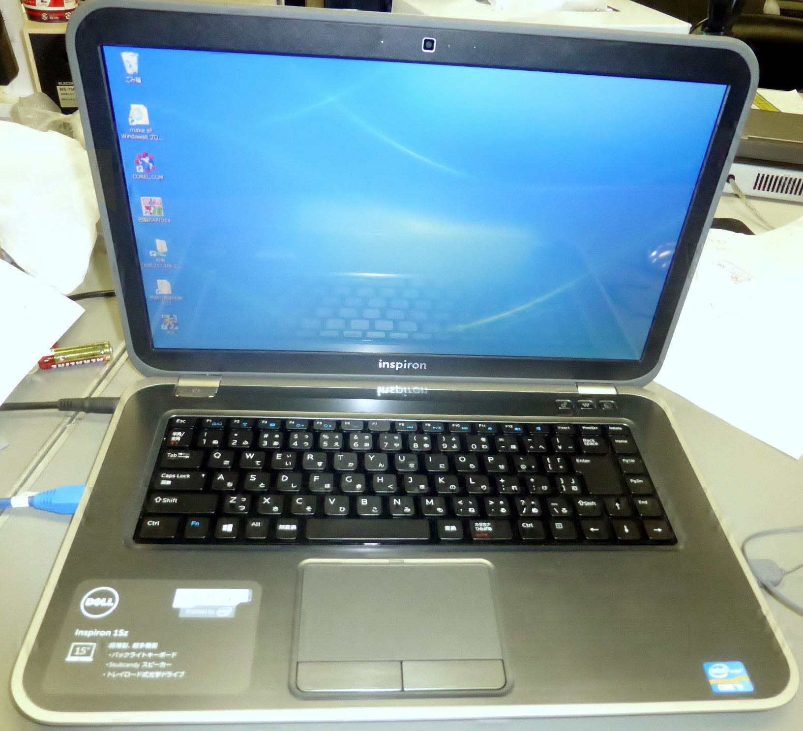 DELL Inspiron 15Xを撮影。